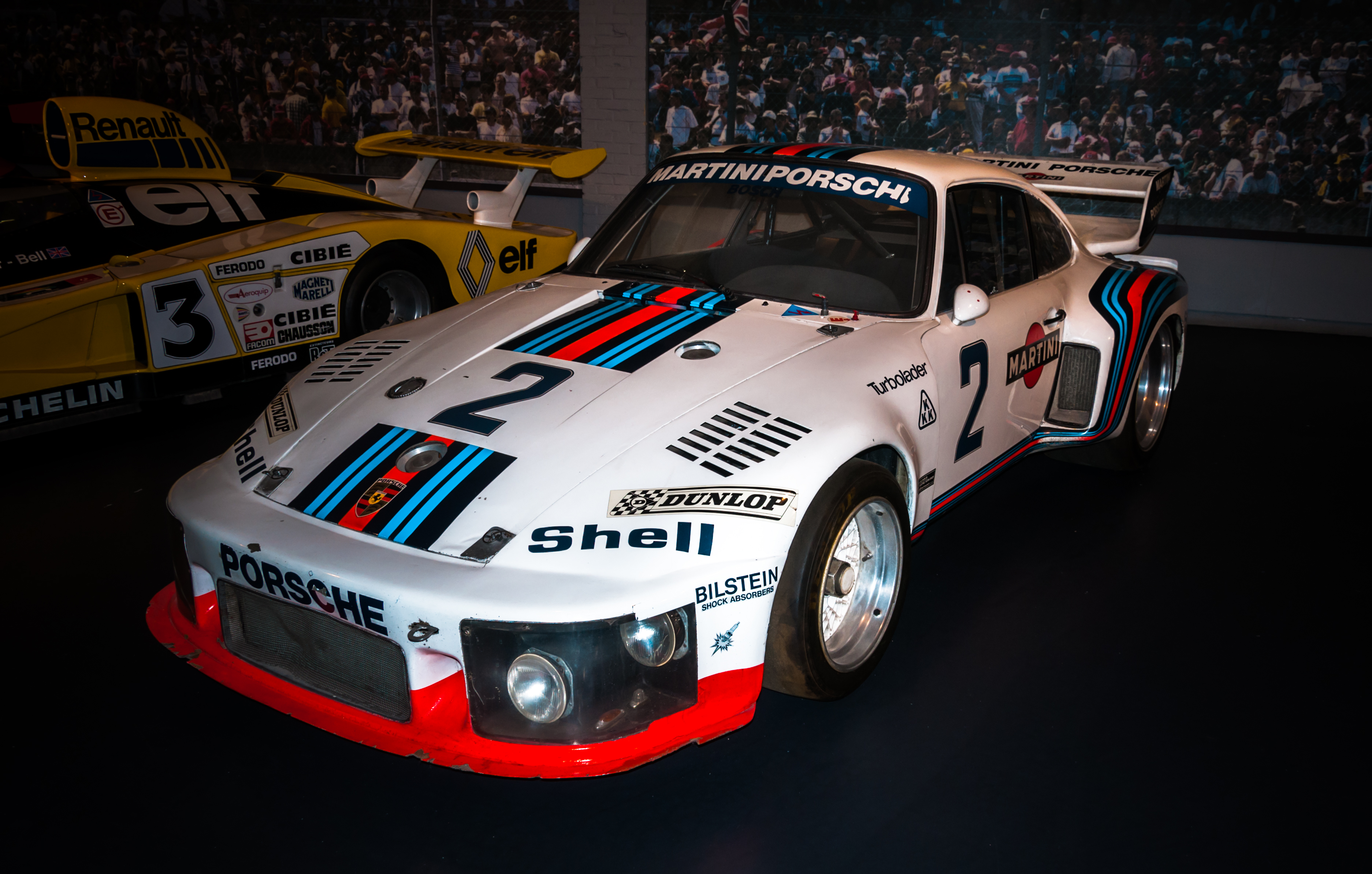 Porsche 935 Martini Racing